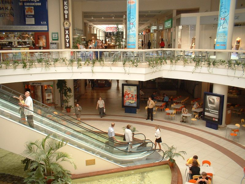 Ukrajina Kijev Trgovački centar u Kijevu